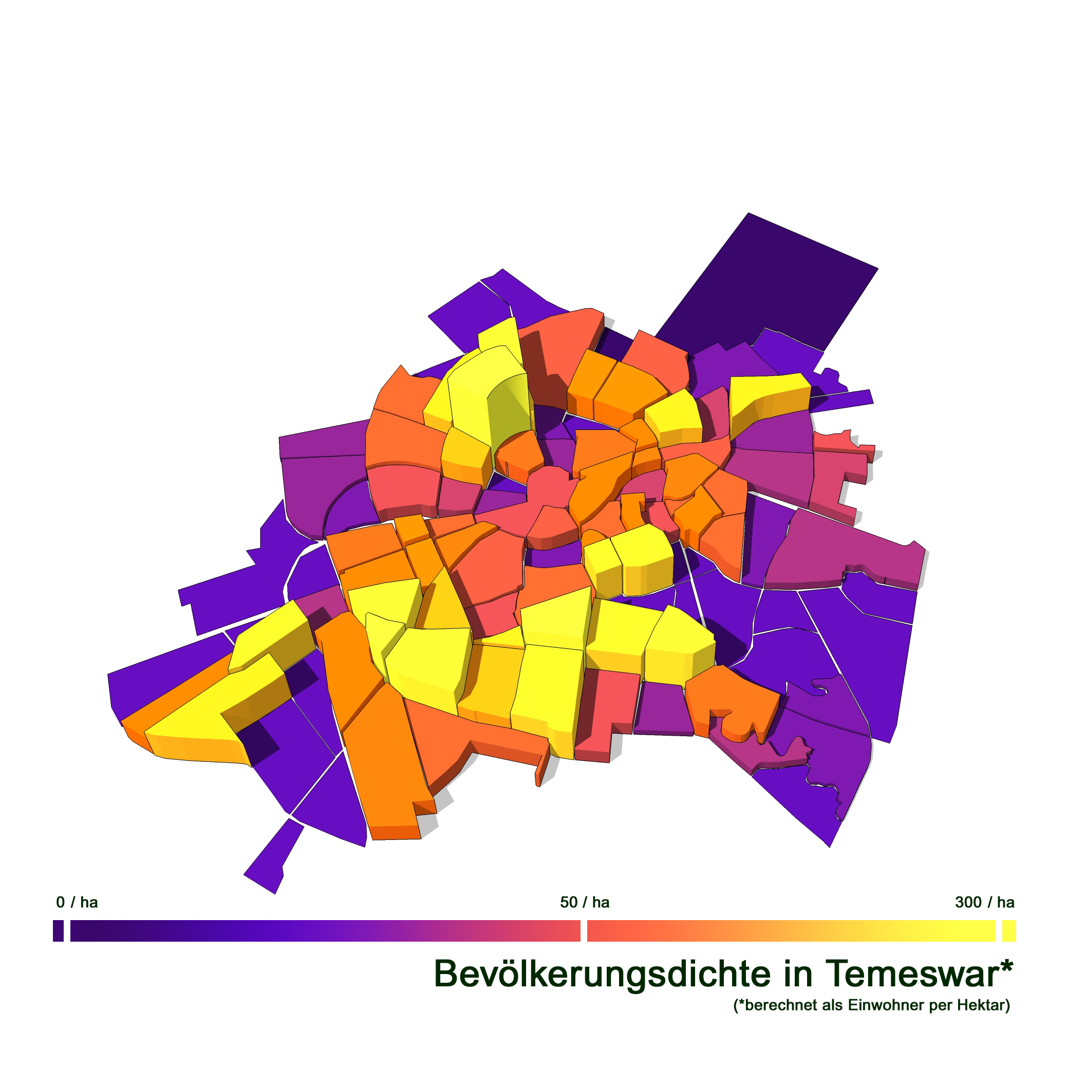 3D Darstellung der Bevölkerungsdichte in Temeswar erstellt von Architekturbüro Plancontrol, für die Studie "Masterplan für Sport und Freizeit in Timisoara"